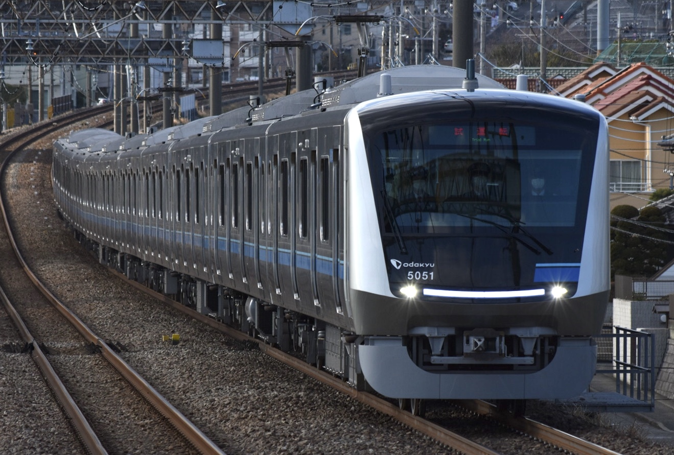 営業運転開始前の乗務員訓練に使用される5051F。